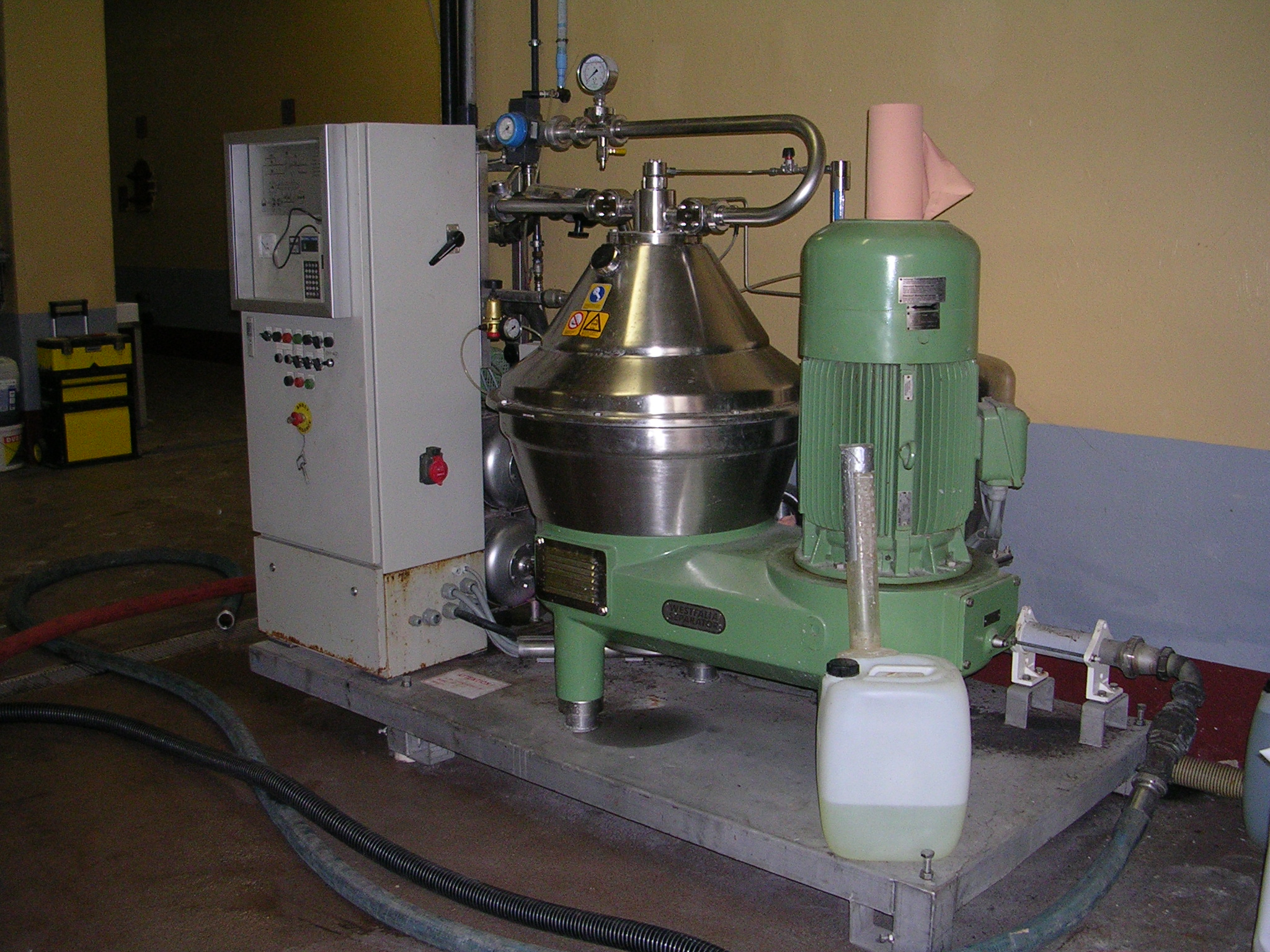 Description : centrifugeuse à assiettes utilisée pour la clarification des vins Origine : image personnelle. VARNA Statut